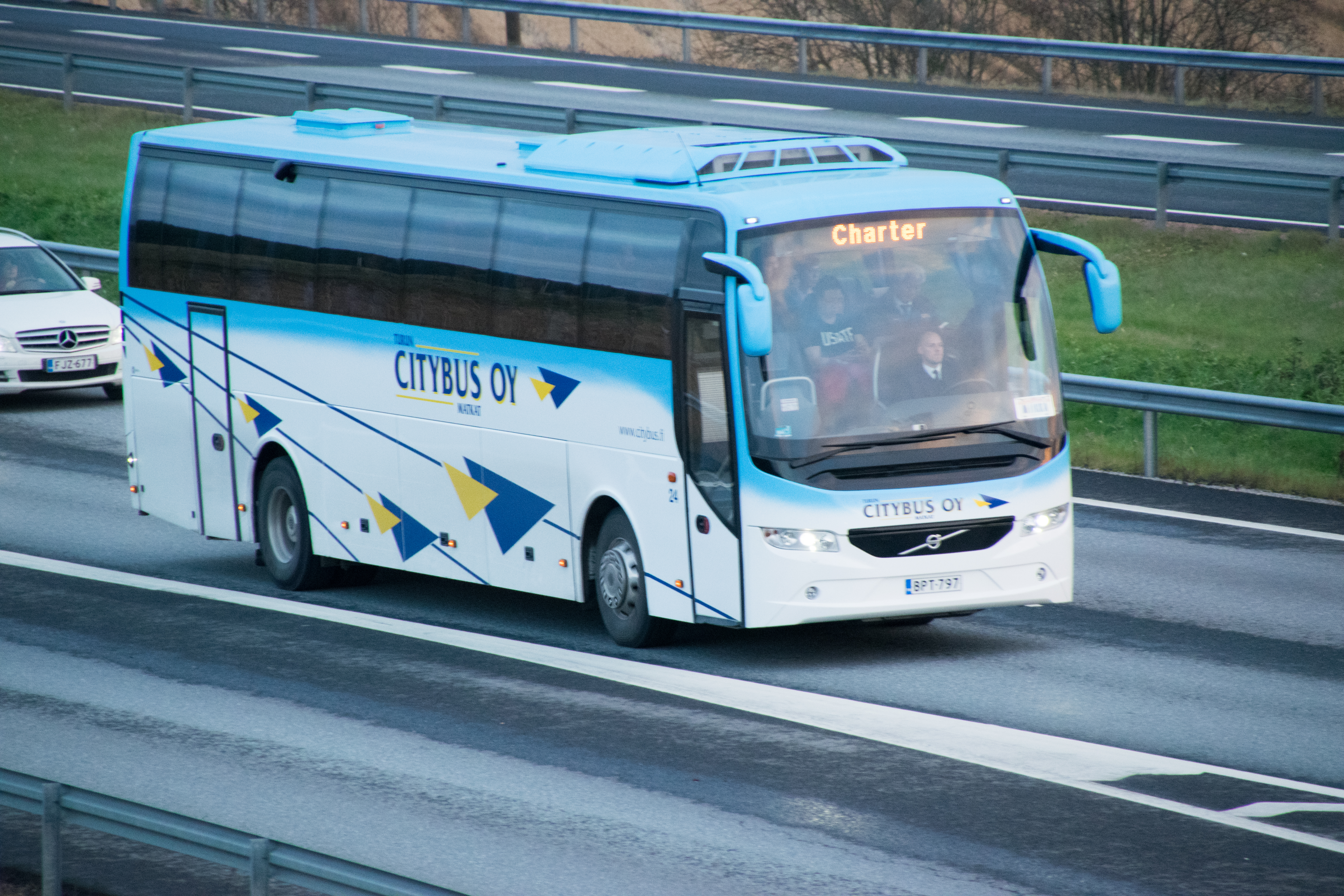 Turun citybus linja-auto